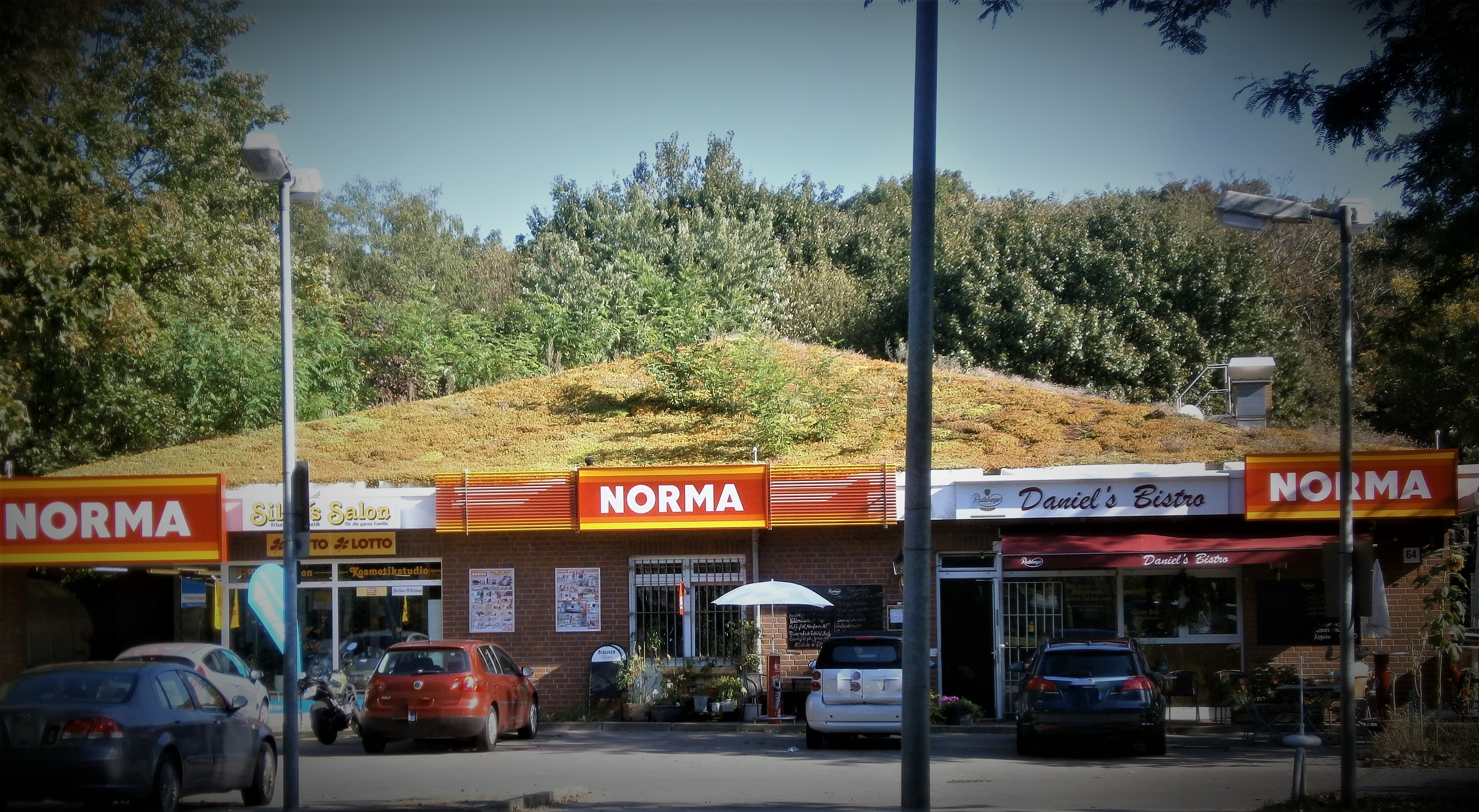 Die Kniprodestraße ist ein Verkehrszug im Berliner Bezirk Pankow, Ortsteil Prenzlauer Berg mit Grundstückszählung in Hufeisen. Bild: Der Flachbau Kniprodestraße 64 wurde mit einem begrünten Dach versehen er steht an der Stichstraße zur Friedhofsmauer und dem Fußweg Gürtelstraße.